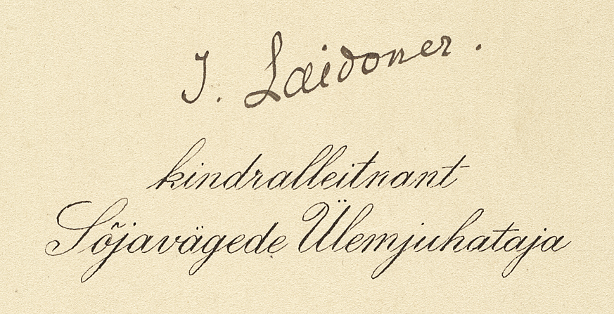 Johan Laidoneri autogramm 1938. aastal Konstantin Pätsile kingitud Tallinna ümbruse kaardil